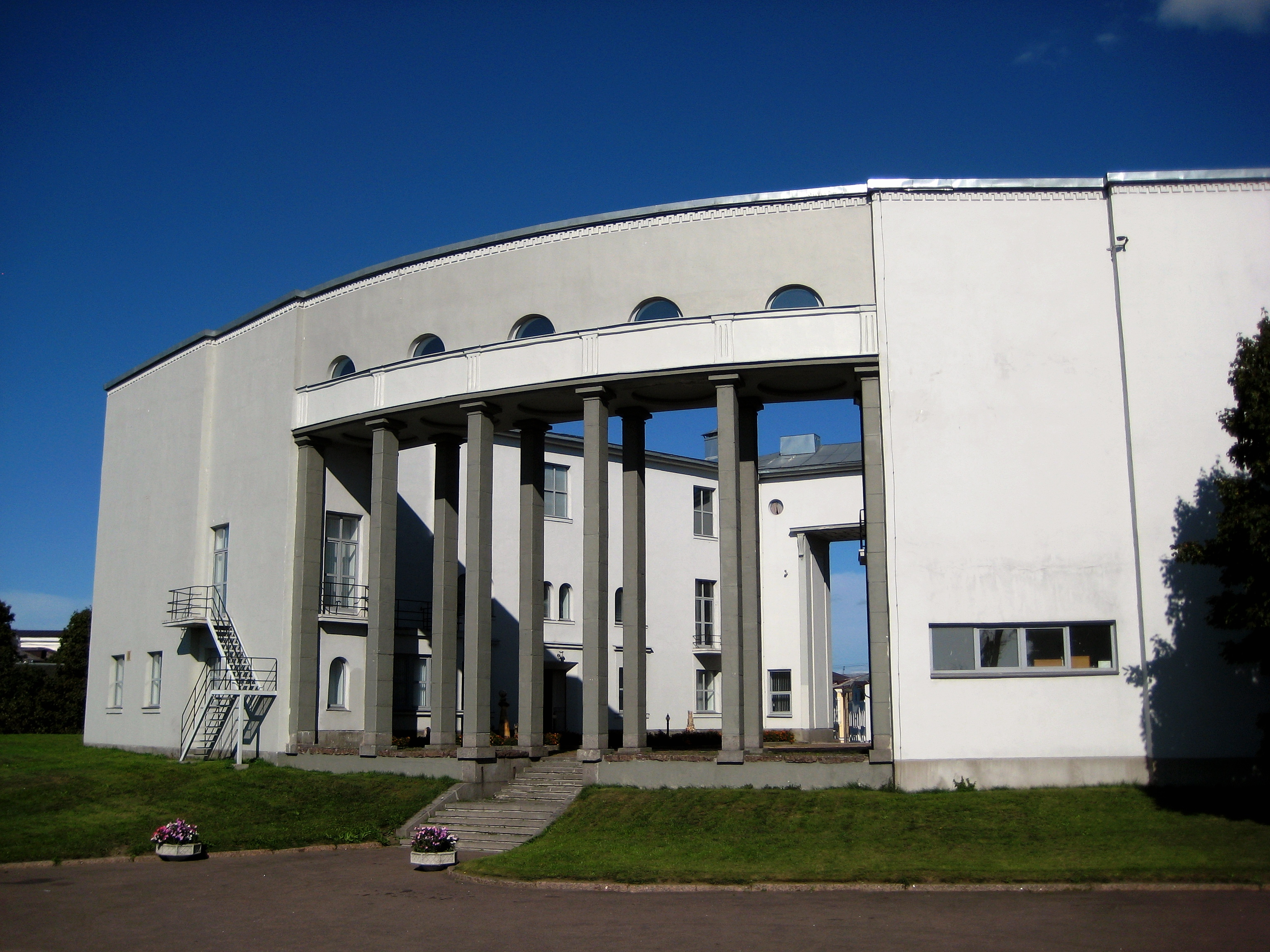 Здание музея изящных искусств и школы живописи (Лен.область, Выборг, Лужская улица, 1)